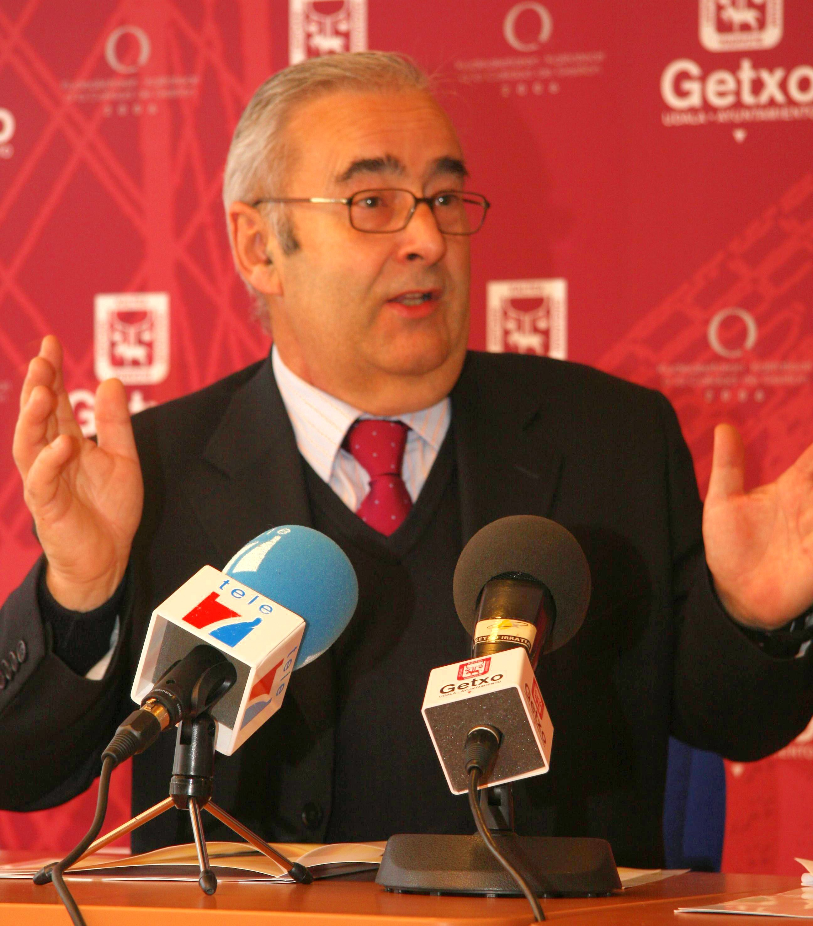 Xabier Kintana euskaltzaina 2008an